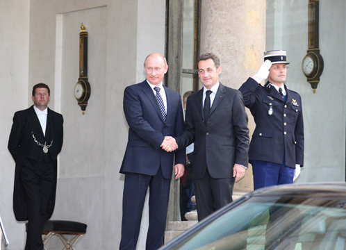 Председатель Правительства РФ Владимир Путин встретился с Президентом Французской Республики Николя Саркози